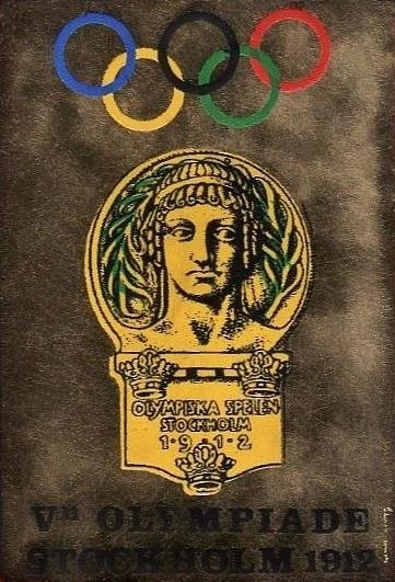 Stockholm Olympic Games 1912, 'Scudetto Campioni dello Sport 1968 - 1969' - 1912, Panini figurina.